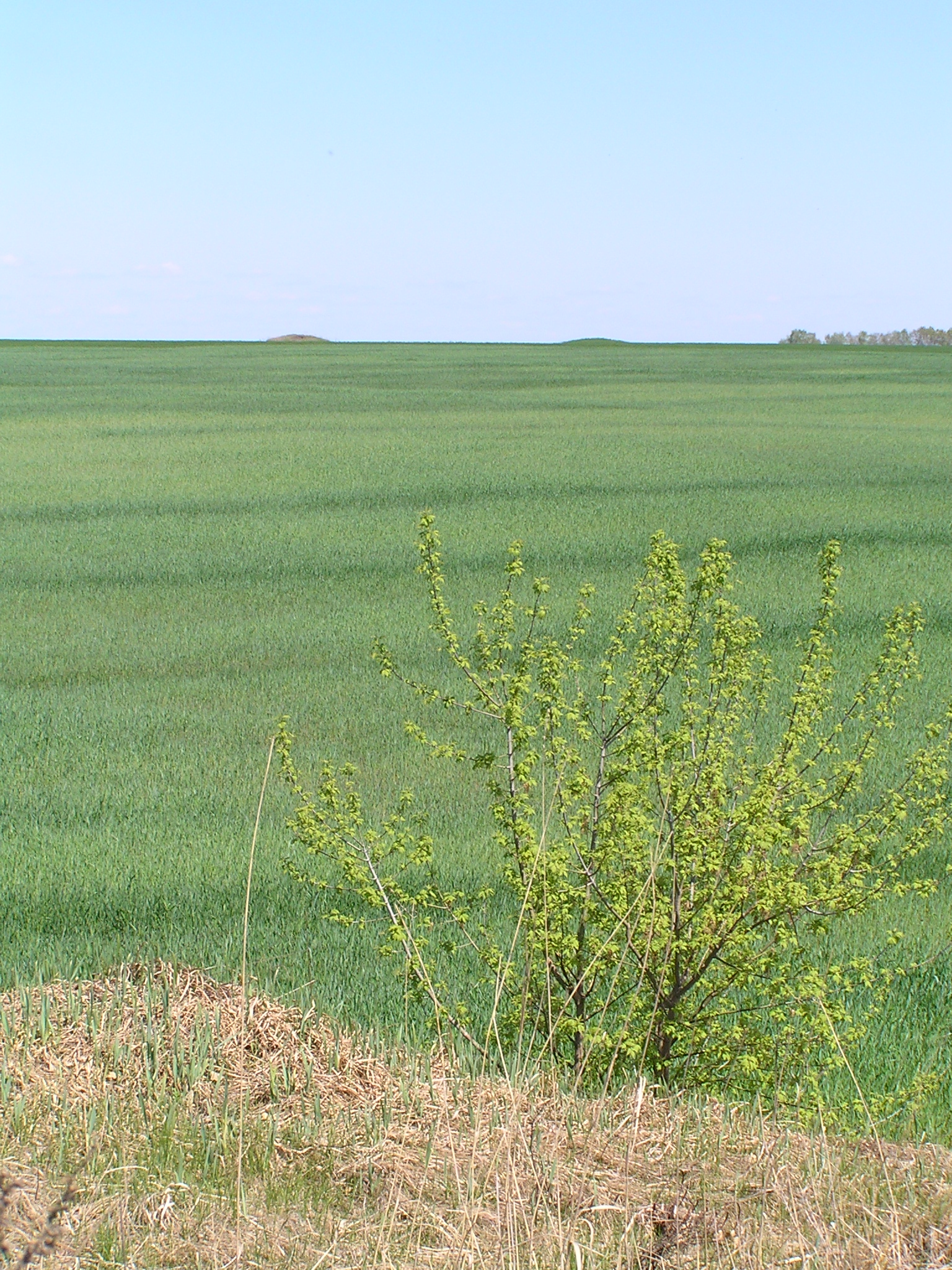 Кургани II тис. до н.е. – I тис. н.е. біля с.Любівка Краснокутського р-ну Харківської обл.